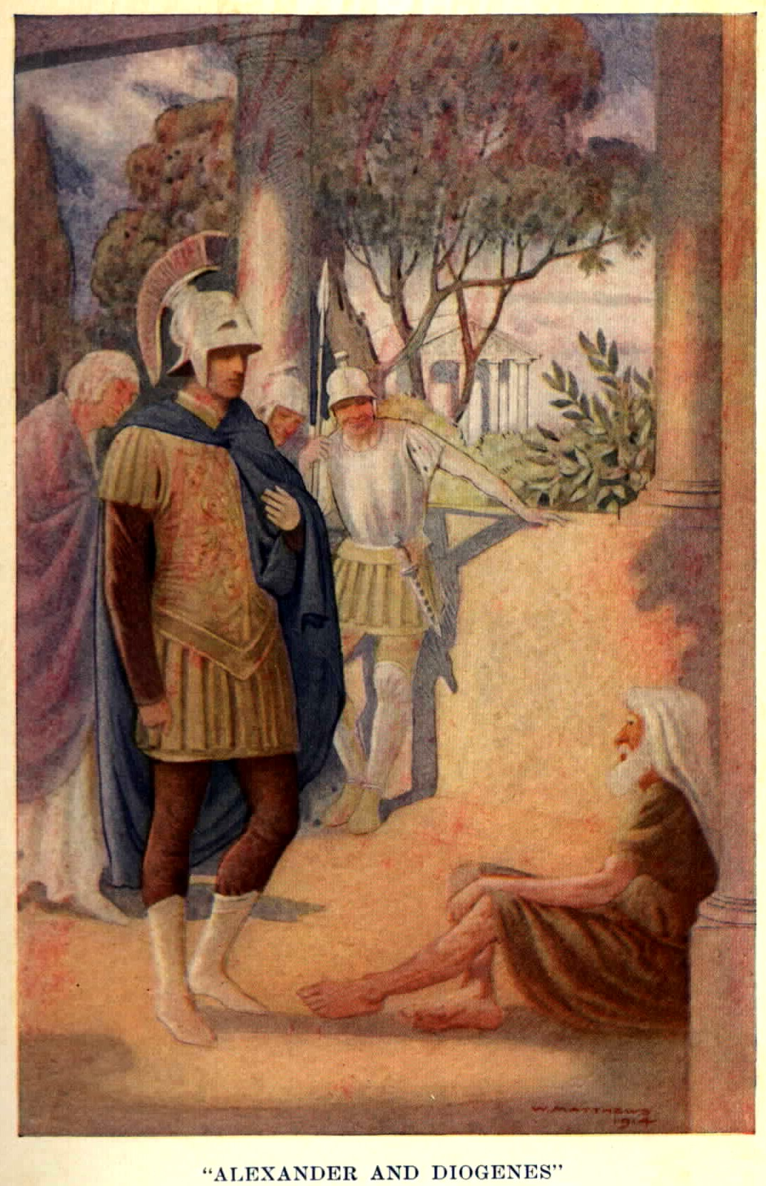 Alexander old drawings